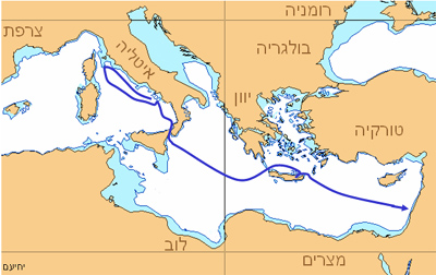 מסלול ההפלגה